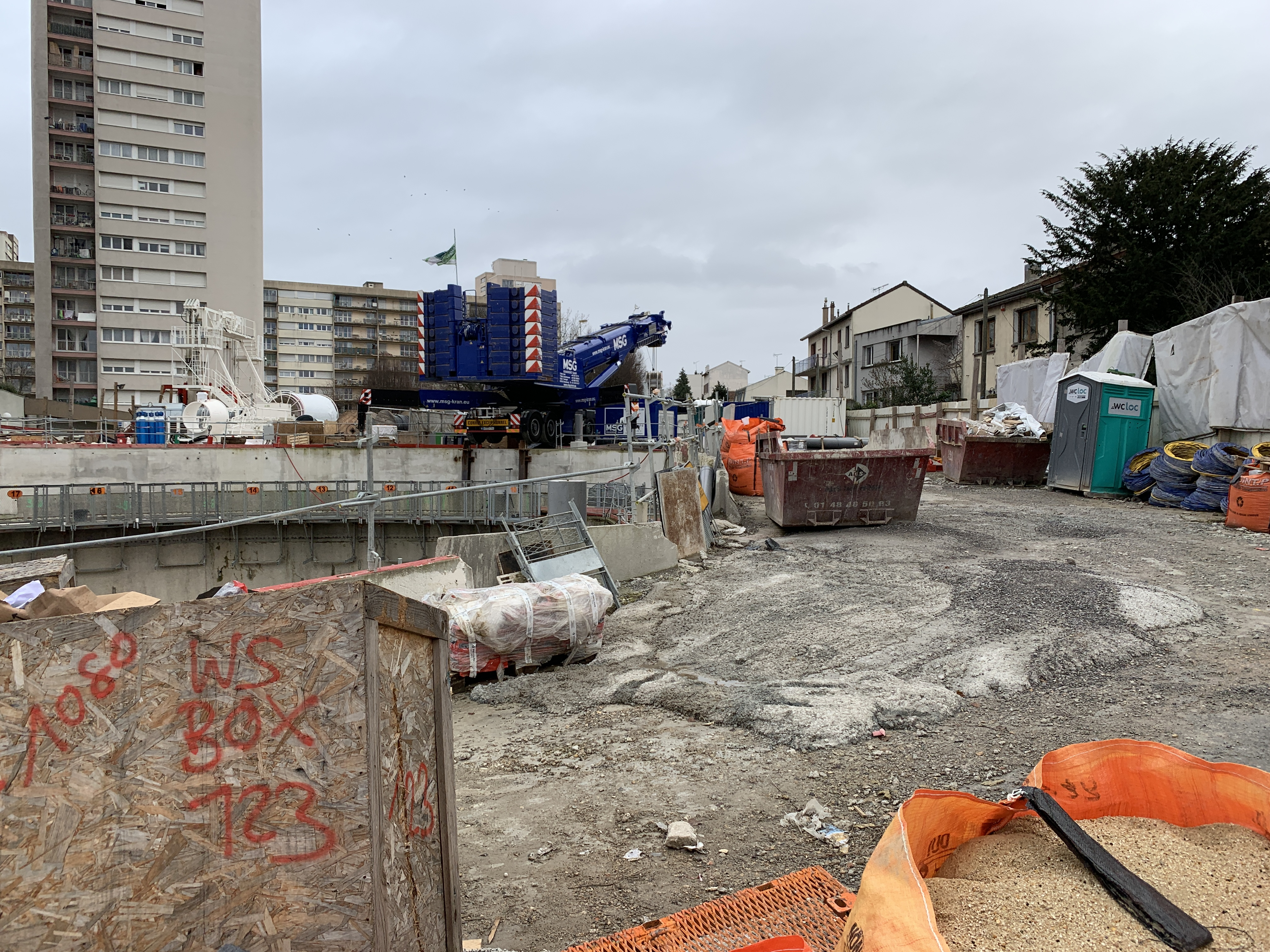 Chantier de construction de la station de métro La Dhuys, Rosny-sous-Bois.